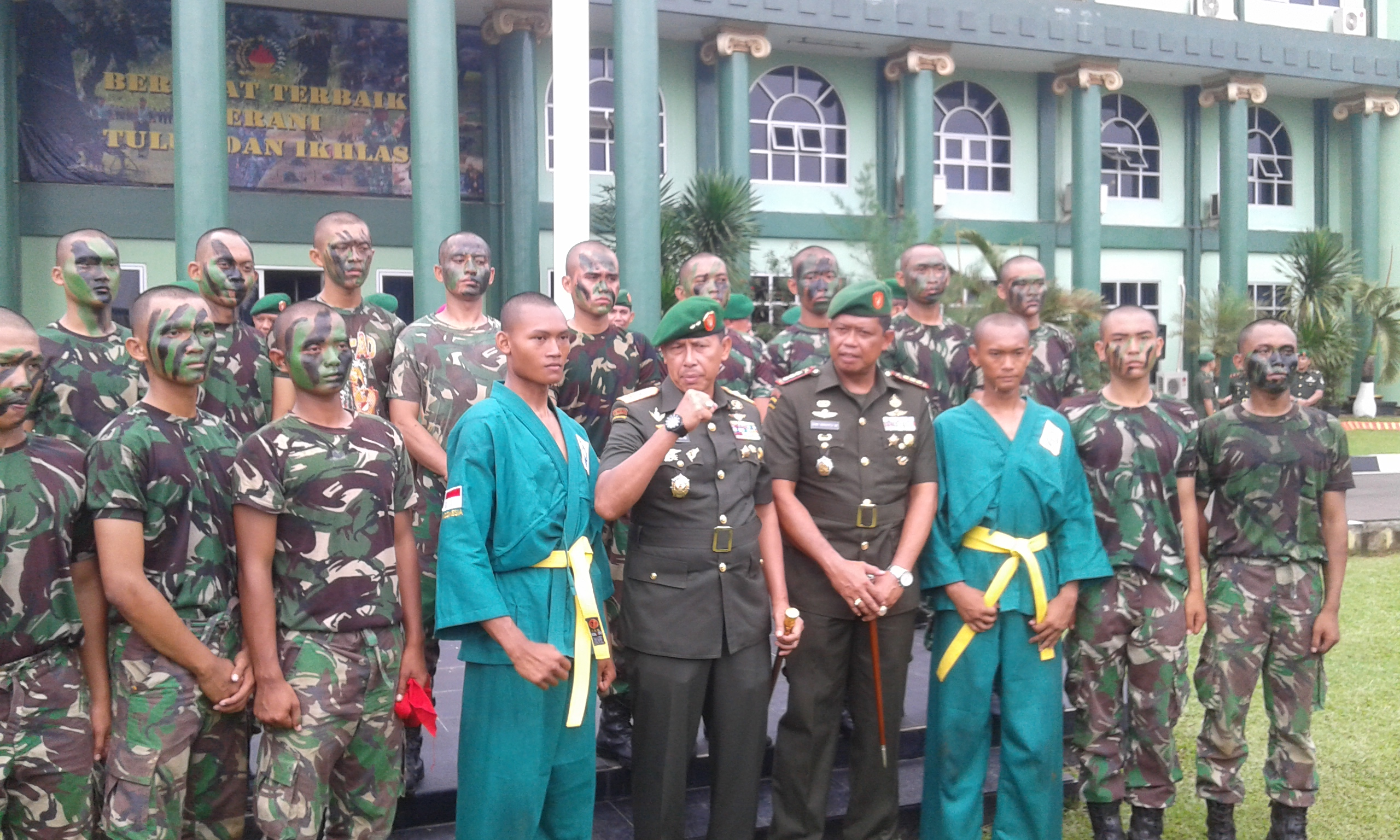 Pangdam Jaya, Mayjen TNI Agus Sutomo dan Danrindam Jaya, Kolonel Inf Dwi Wahyu Winarto melakukan foto bersama para mantan siswa Dikmaba TNI AD tahun 2015 di Rindam Jaya, Condet, Jakarta Timur.